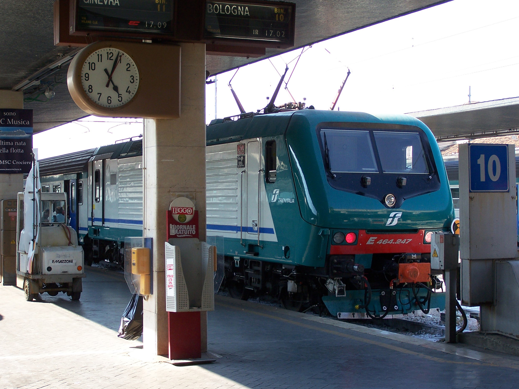 Venezia SL